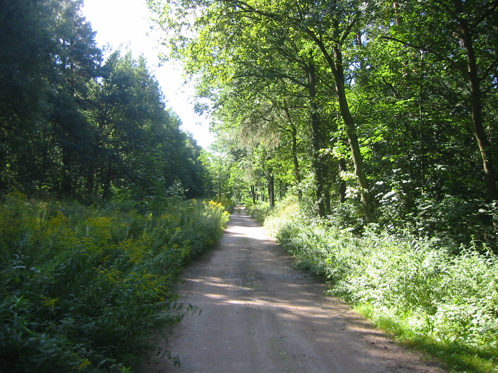 Fürstenwalder Spreetalniederung zwischen Kienbaum (Grünheide) und Grünheide (Mark). Es wird von dem namensgebenden Fluss Löcknitz, einem rechten Nebenfluss der Spree in einem 13km langen Niedermoor määnderförmig durchflossen.